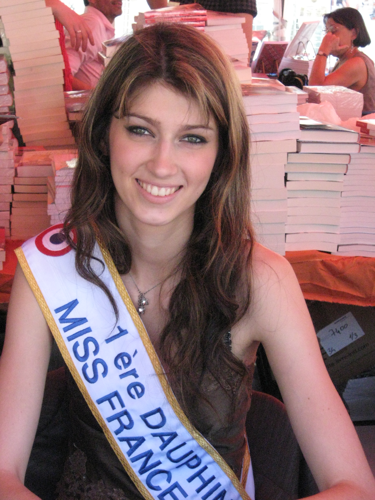 Sophie Vouzelaud, 1re dauphine à l'élection de Miss France 2007